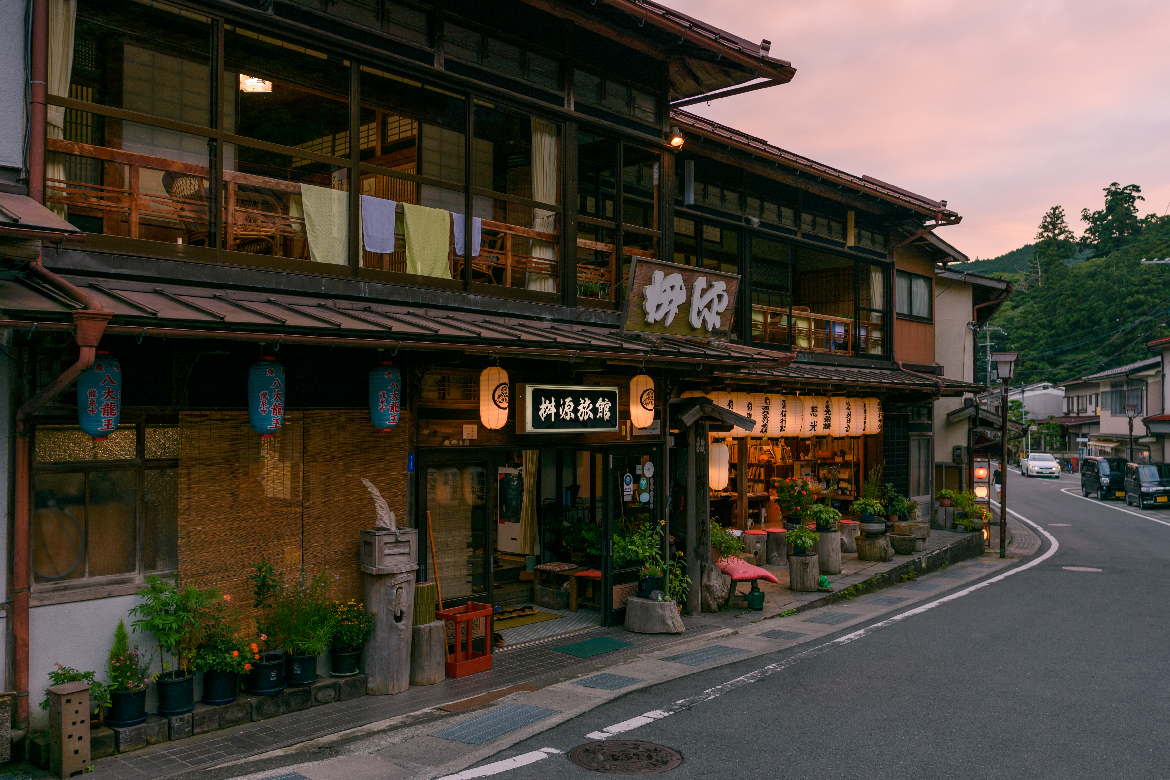 洞川温泉の桝源